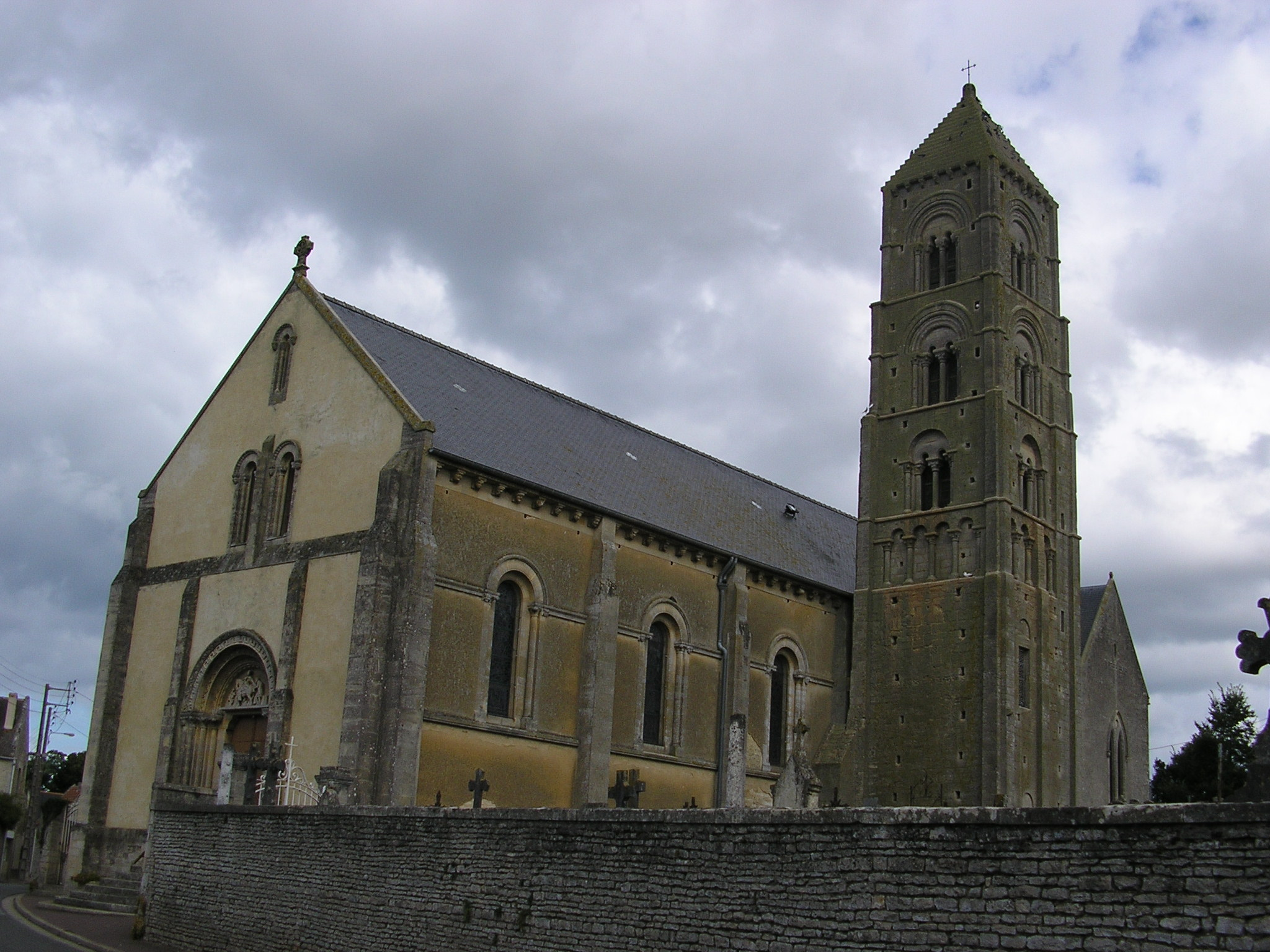 Église Saint-Martin de Ver-sur-Mer (Calvados, France) construite au Xe-XIIe siècles et remaniée au XIXe. Le clocher est classé depuis 1879.